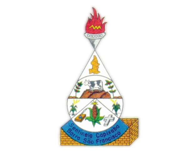 Brasão da cidade de Barra de São Francisco, ES, Brasil